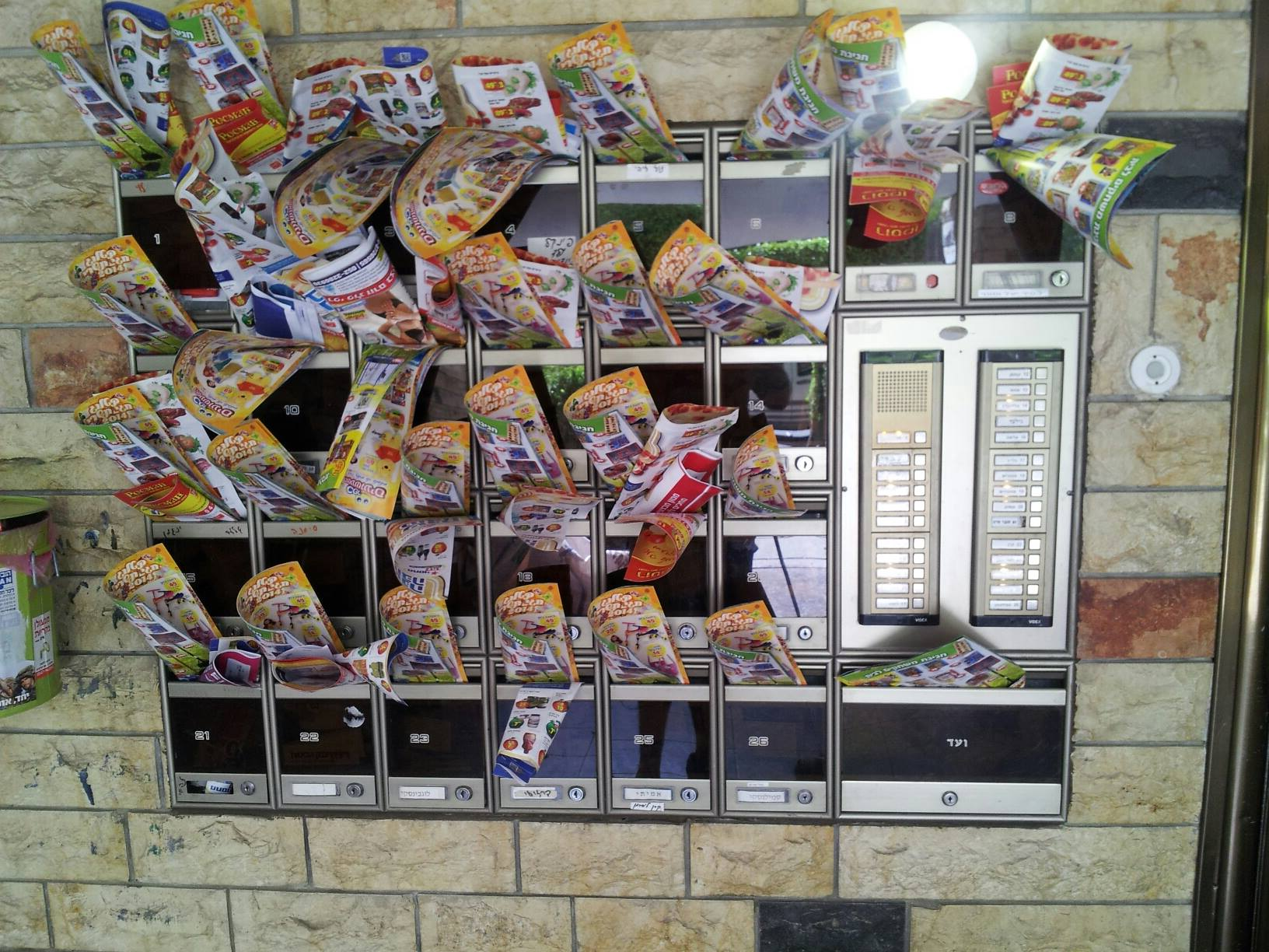 עלוני פרסום המחולקים בתיבות דואר